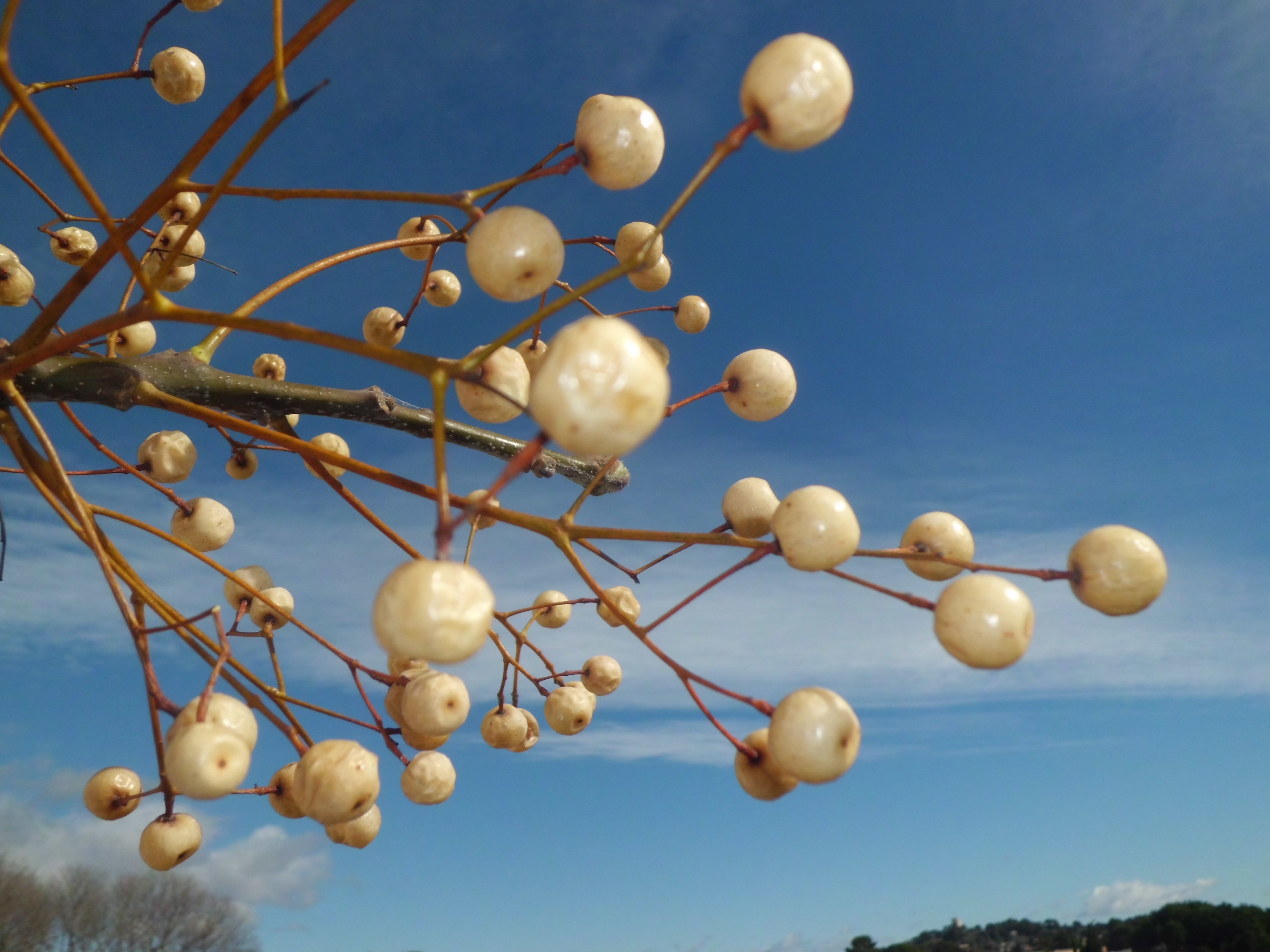 drupe de melia, un arbre d' alignement